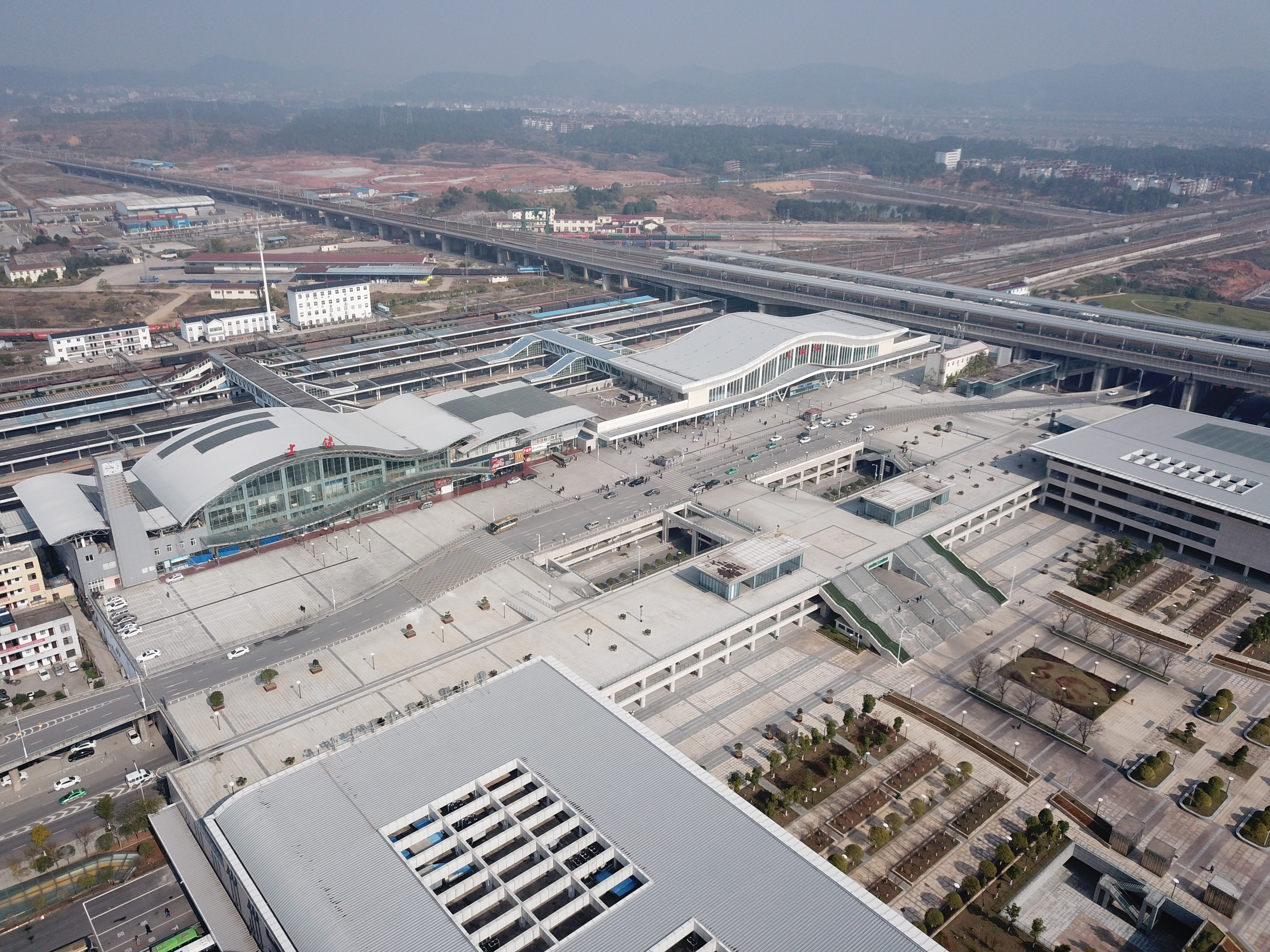 上饶站